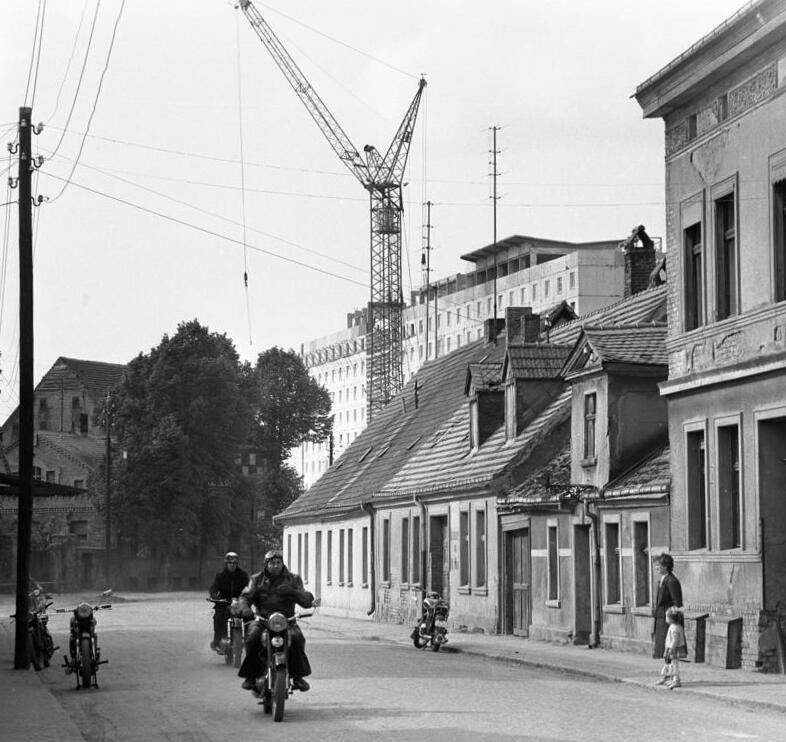 Zentralbild - Hedemann tre. 2.6.1964 1509 Wohnungen...werden im Jahr 1964 (1963 waren es nur 1017) in Schwedt (Bezirk Frankfurt-Oder) übergeben. Davon sollen Ende Juni bereits 510 Wohnungen bezugsfertig sein.